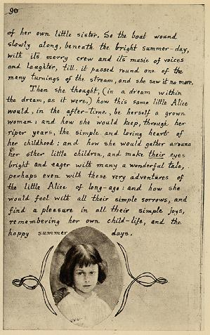 Dernière page du manuscrit illustré des Aventures d'Alice au pays des merveilles destiné à Alice Liddell (f.46v/p.90)